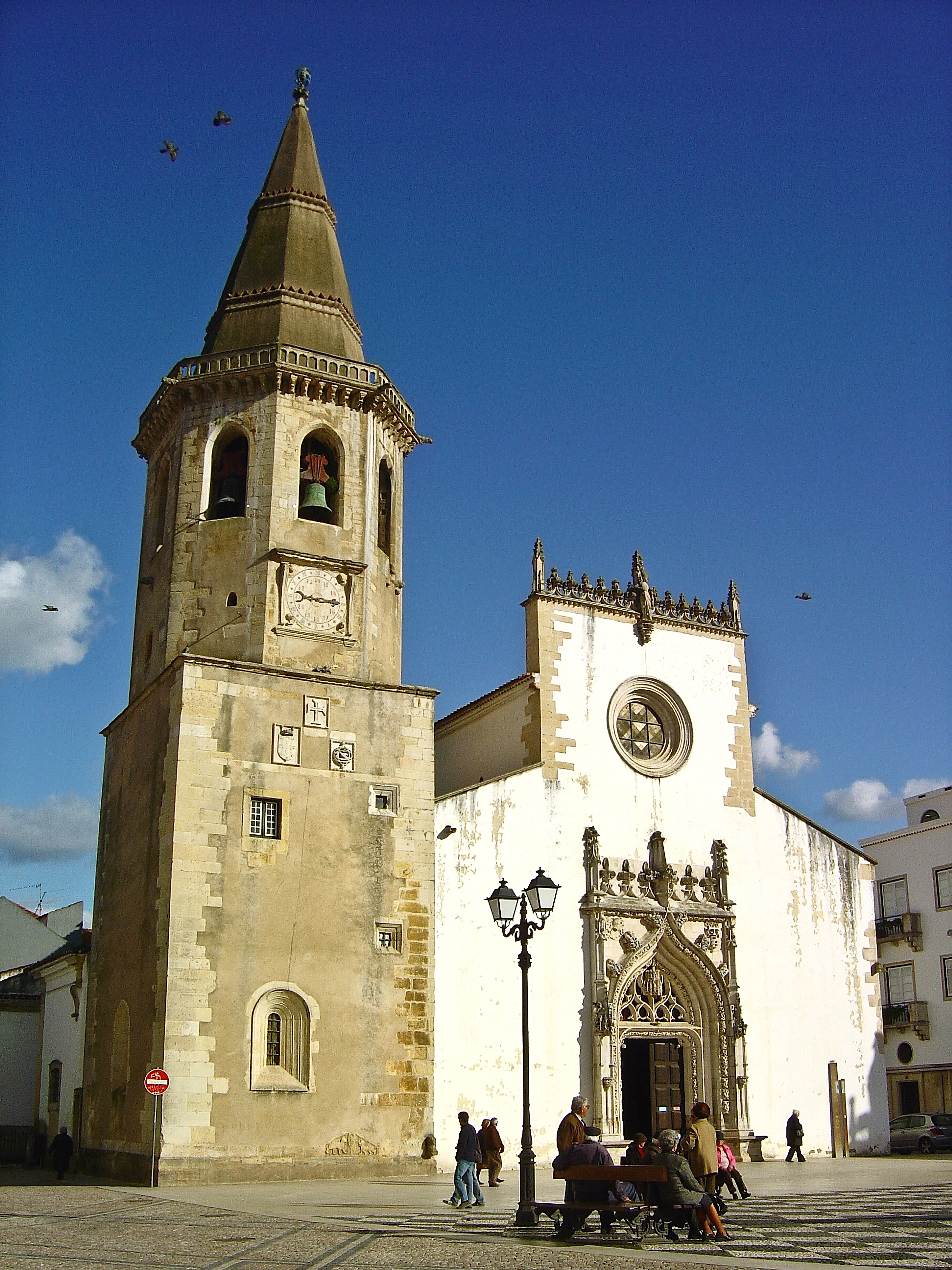 A Igreja de São João Baptista situa-se na Praça da República em Tomar. A igreja de finais do século XV tem um portal manuelino rematado por um coruchéu octogonal. No interior há um púlpito esculpido em pedra, azulejos denominados "Ponta de diamante" e pinturas do século XVI que incluem uma Última Ceia de Gregório Lopes. A área em volta da igreja é o centro da Festa dos Tabuleiros, de origem pagã é realizada em Julho de quatro em quatro anos, e em que as raparigas, da cor da sua fregesia, transportam à cabeça tabuleiros com pães e flores. A celebração tem raízes semelhantes à da Festas do Espírito Santo nos Açores. A igreja foi classificada como Monumento Nacional em 1910. See where this picture was taken. [?]